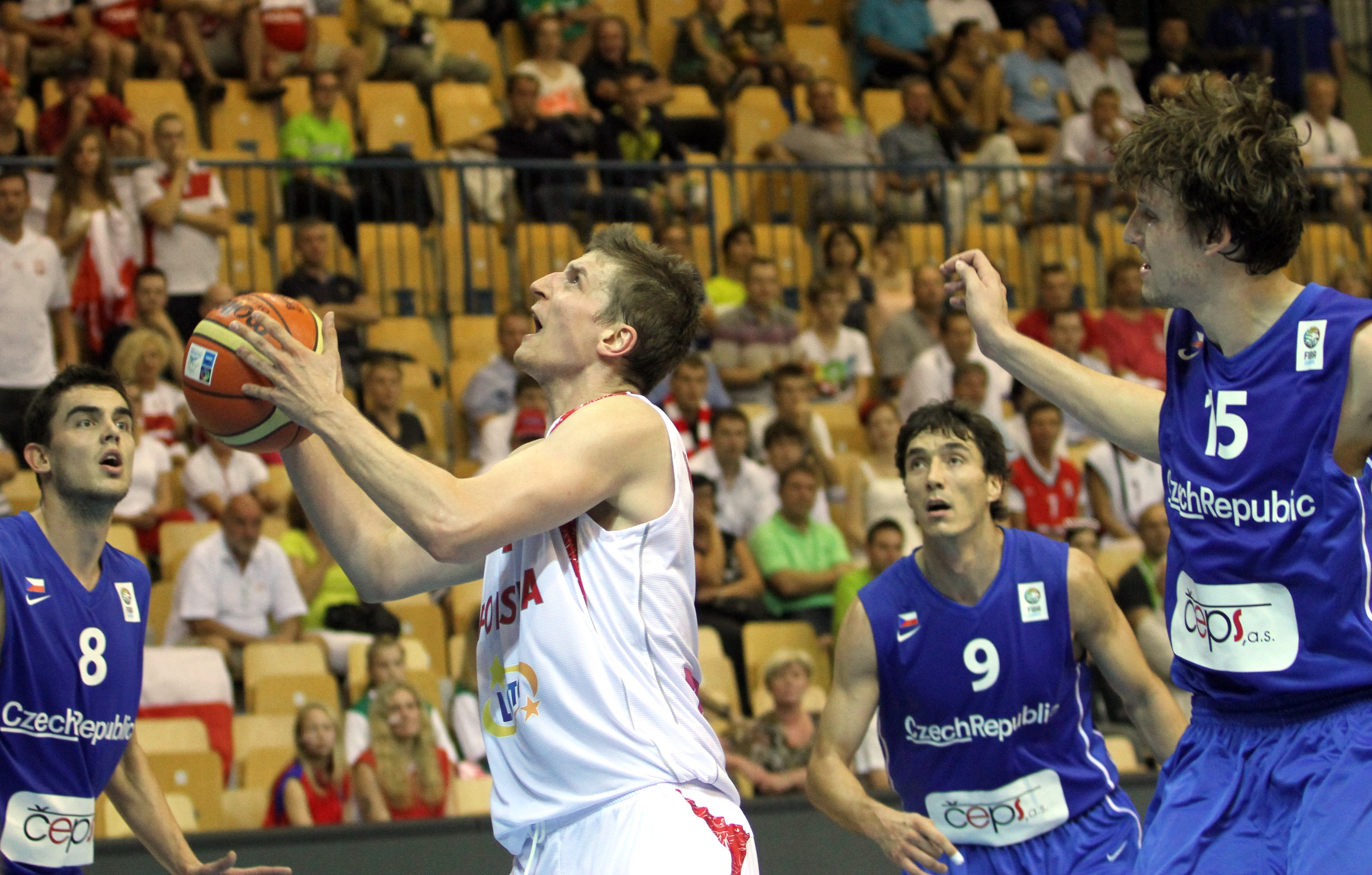 Reprezentacja Polski koszykarzy z 2013 roku. Adam Waczyński